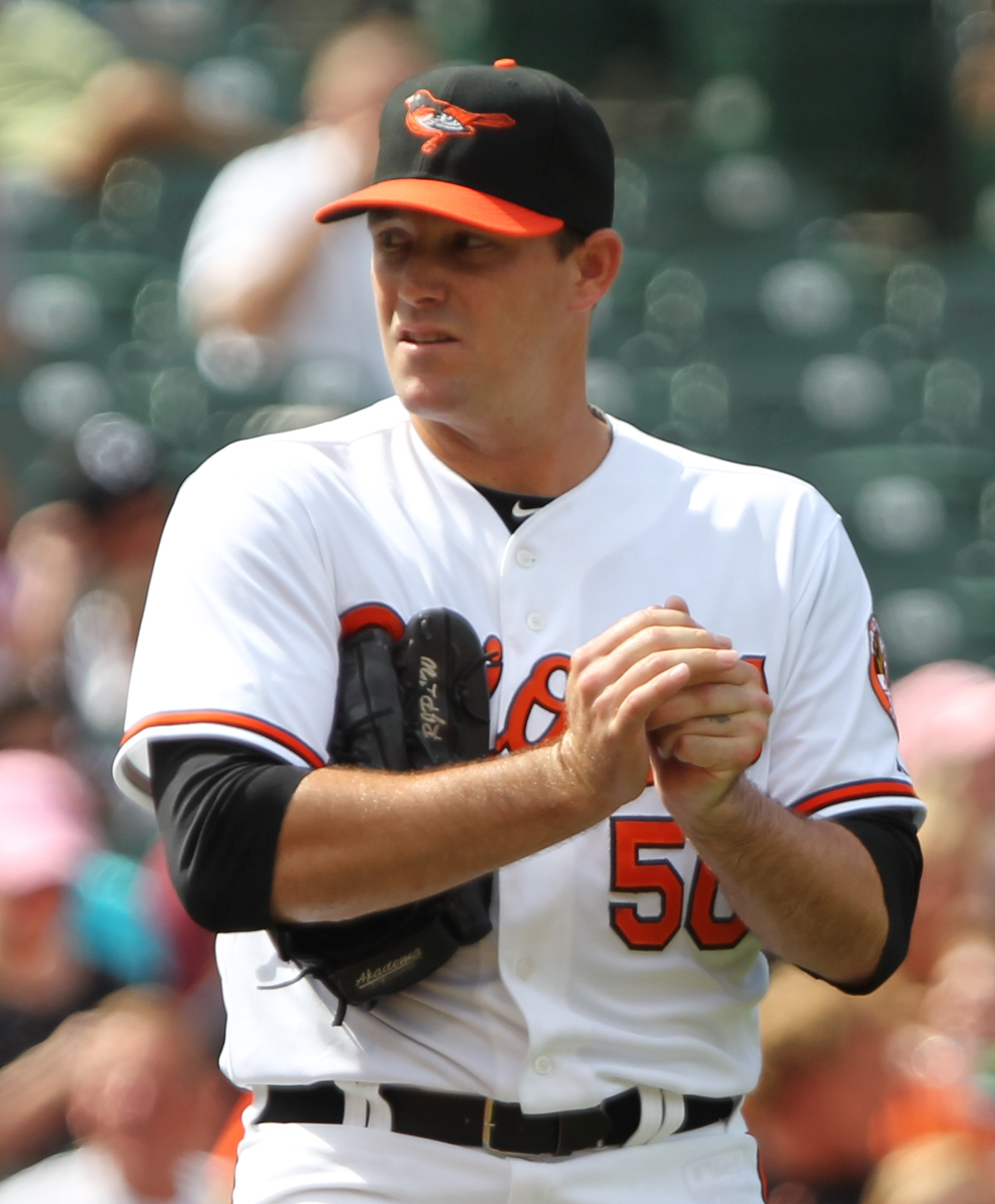 Willie Eyre